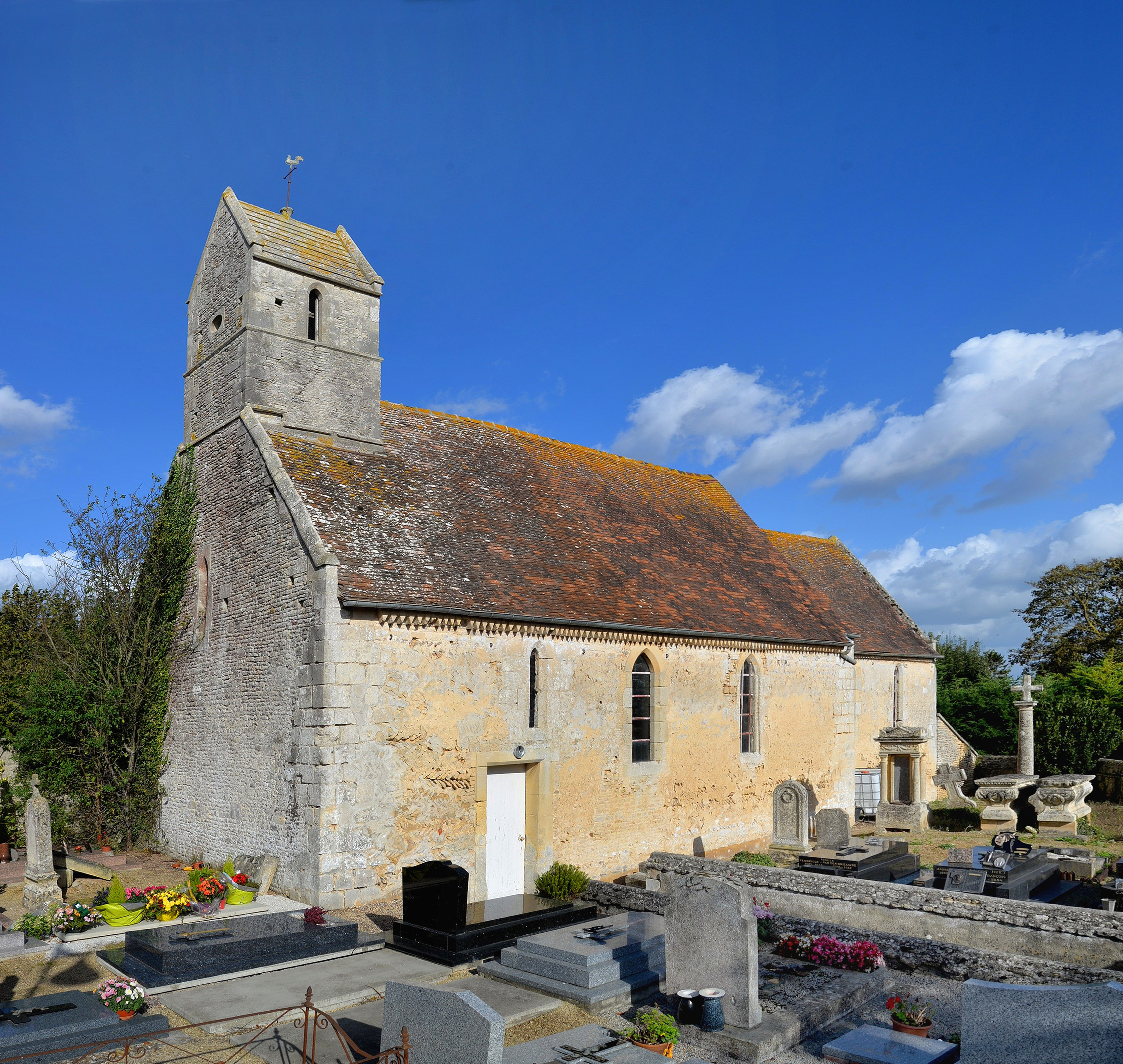 Conteville